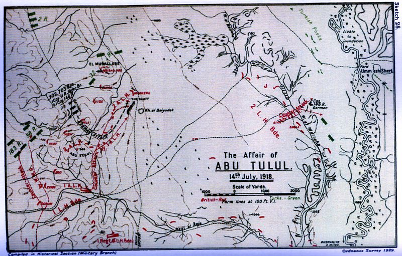 מפת הקרב ב14 ביולי 1918